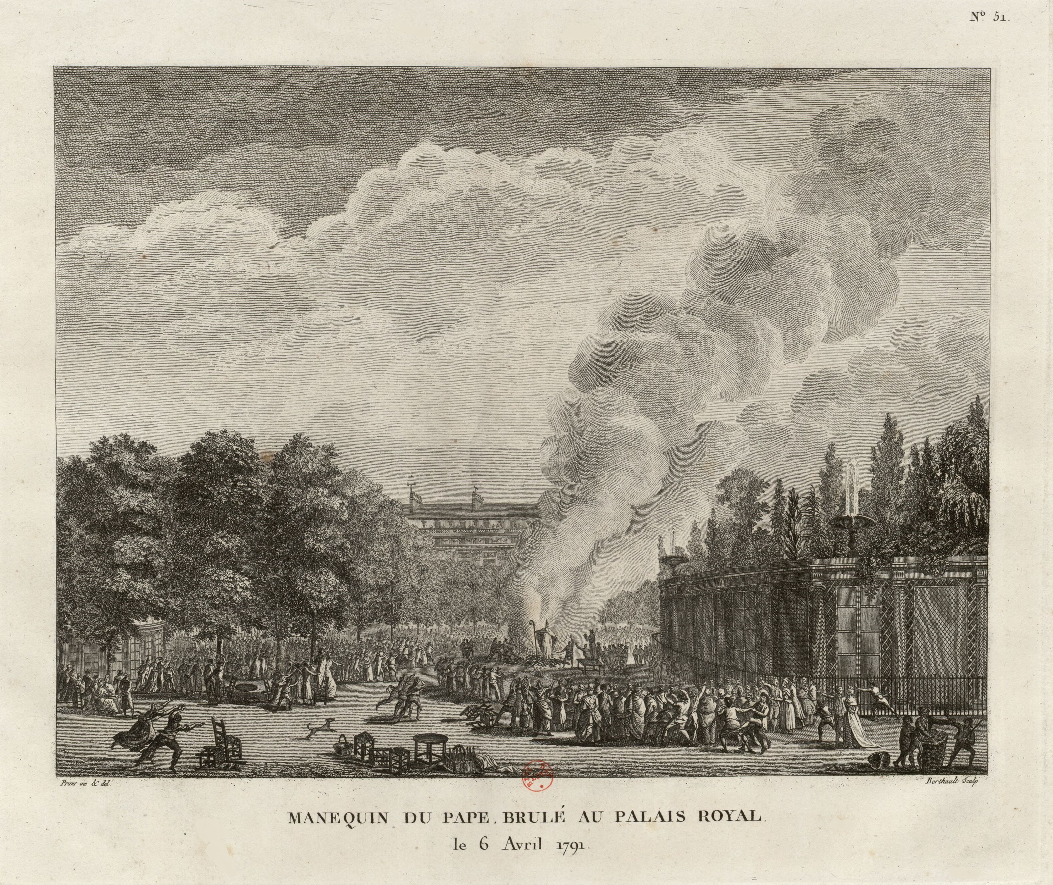 Mannequin du Pape brûlé au Palais Royal, le 6 avril 1791.